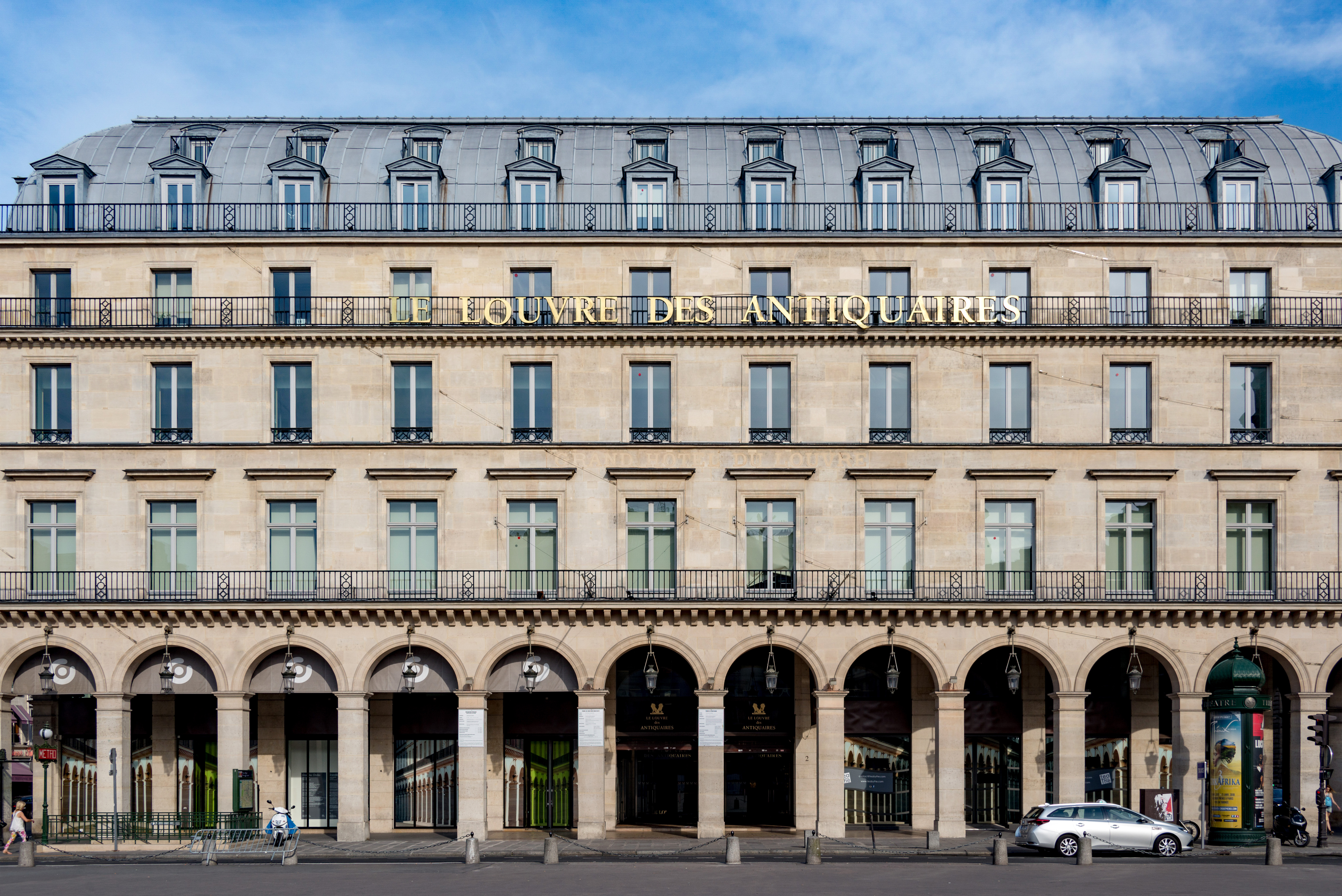 58575-Paris